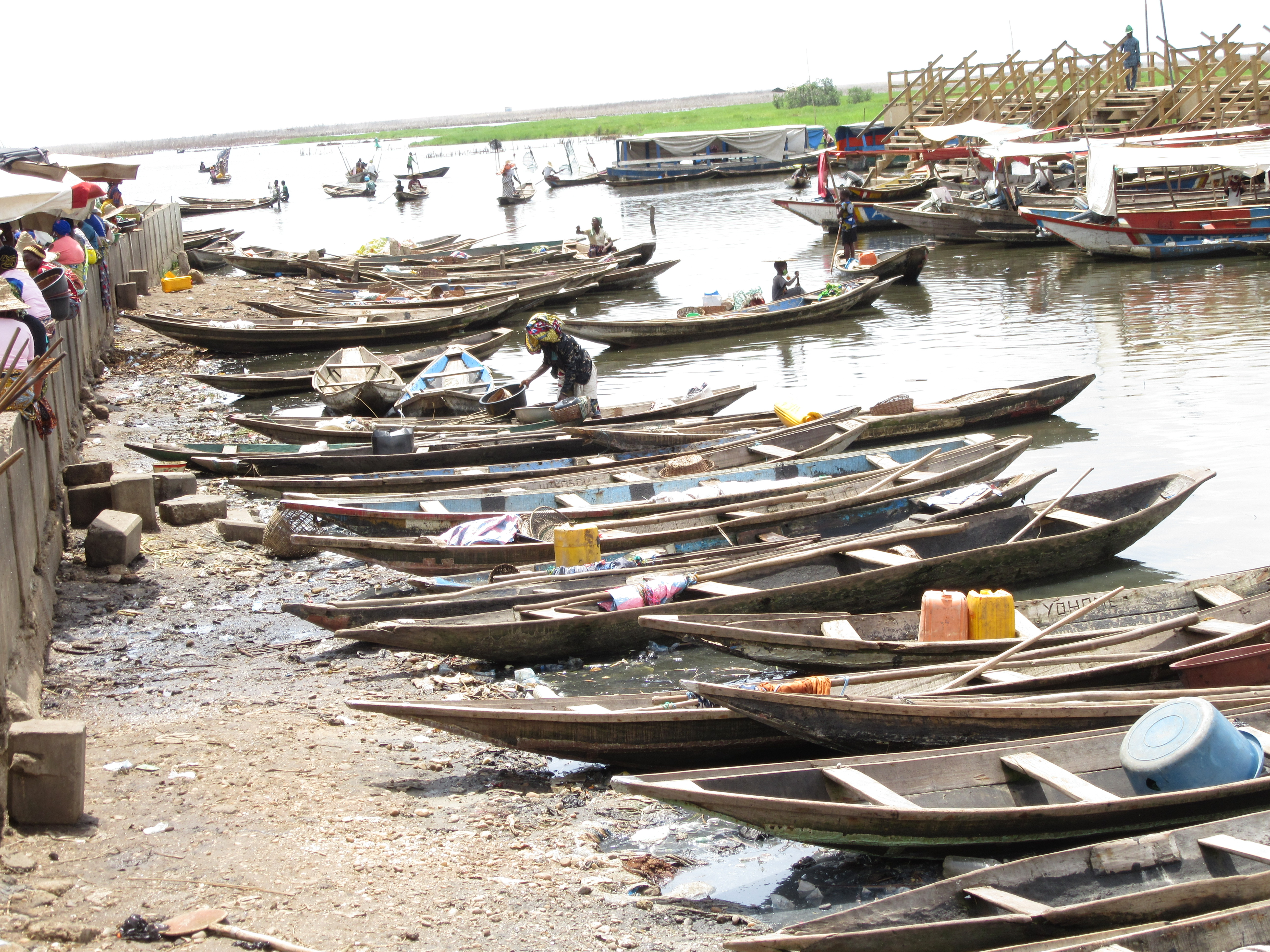 Calavi, embarcadère pour Ganvié This is an image with the theme "Africa on the Move or Transport" from: Benin